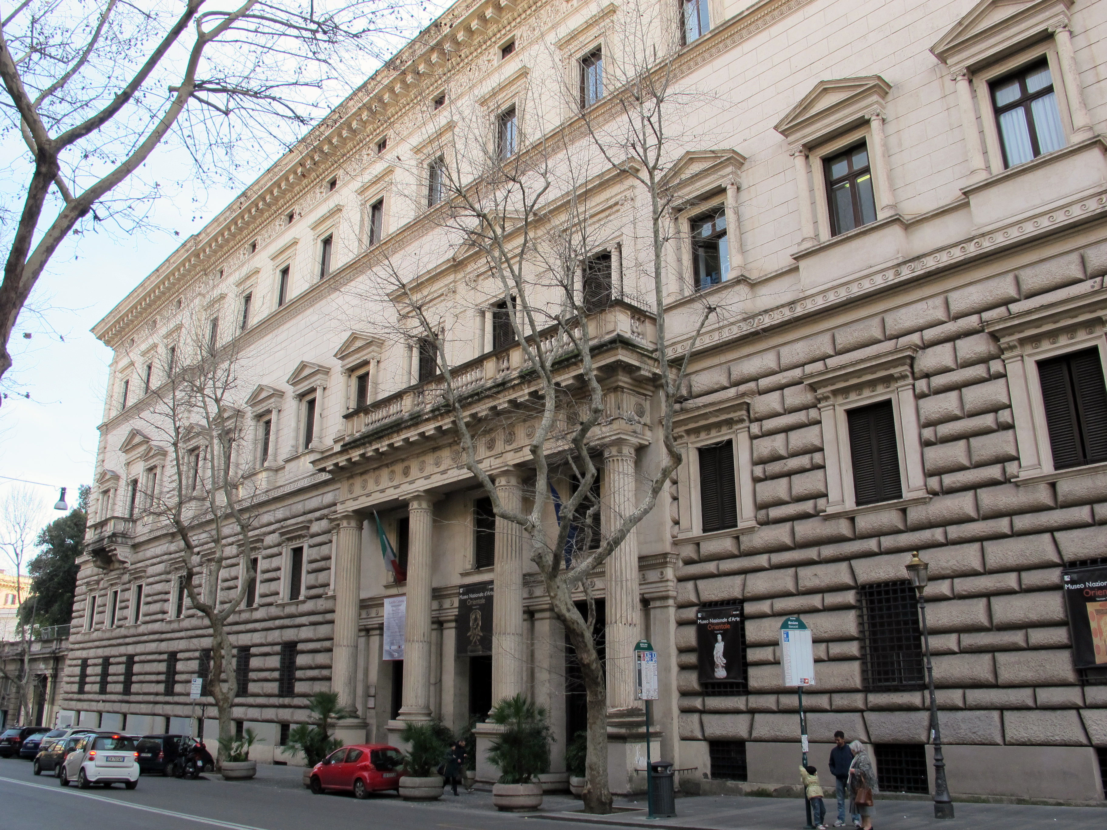 Palazzo brancaccio, facciata